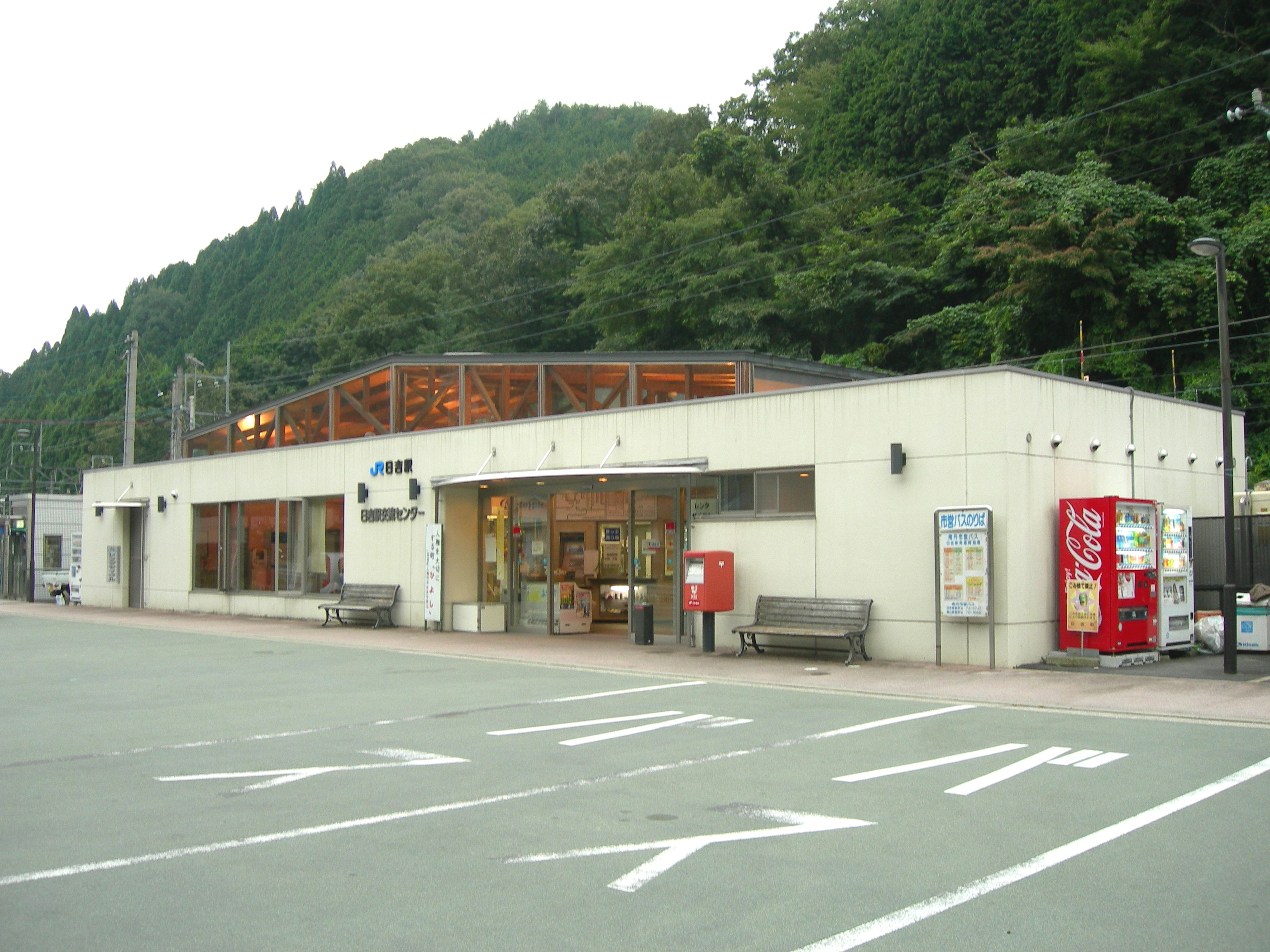 JR西日本 日吉駅 (京都府)